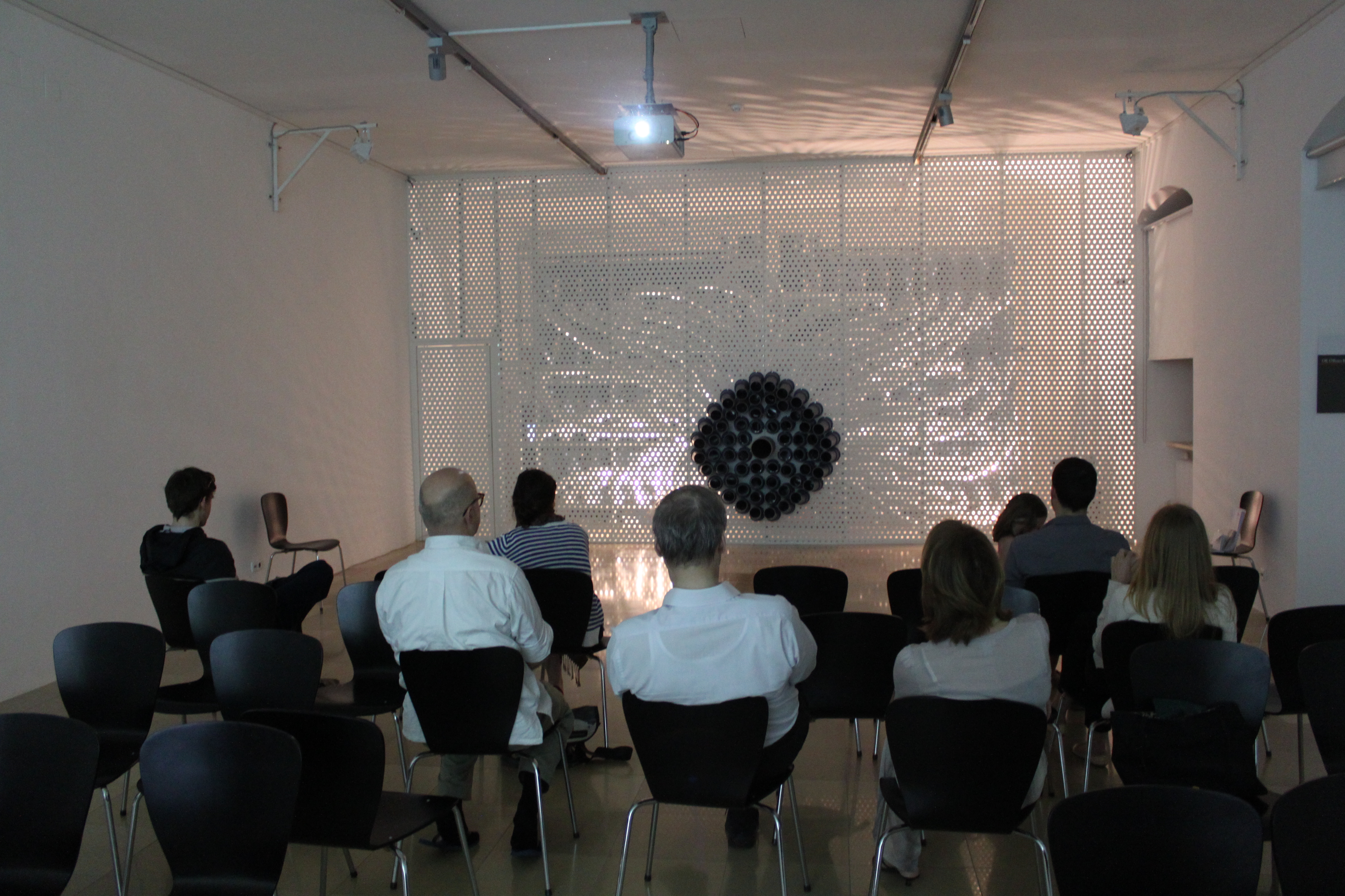 Geruchsorgeläußeres im Brückenraum des Ursulinenhofes, Zugang über eine Brücke vom OK aus, Vorführung mit Düften und Geräuschen